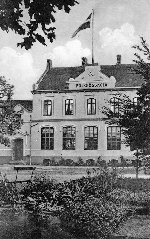 Önnestads Folkhögskola.